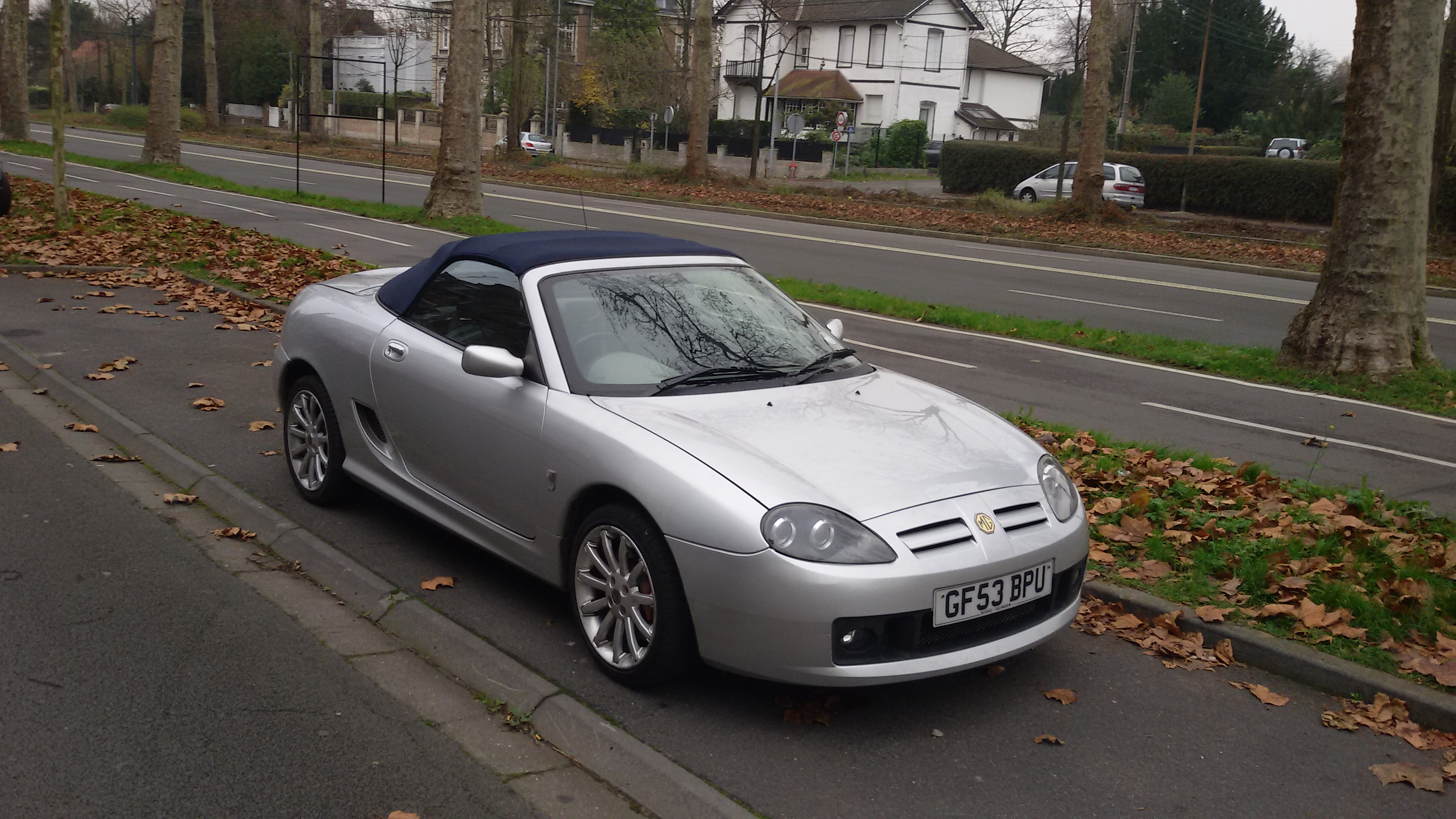 modèle 2003